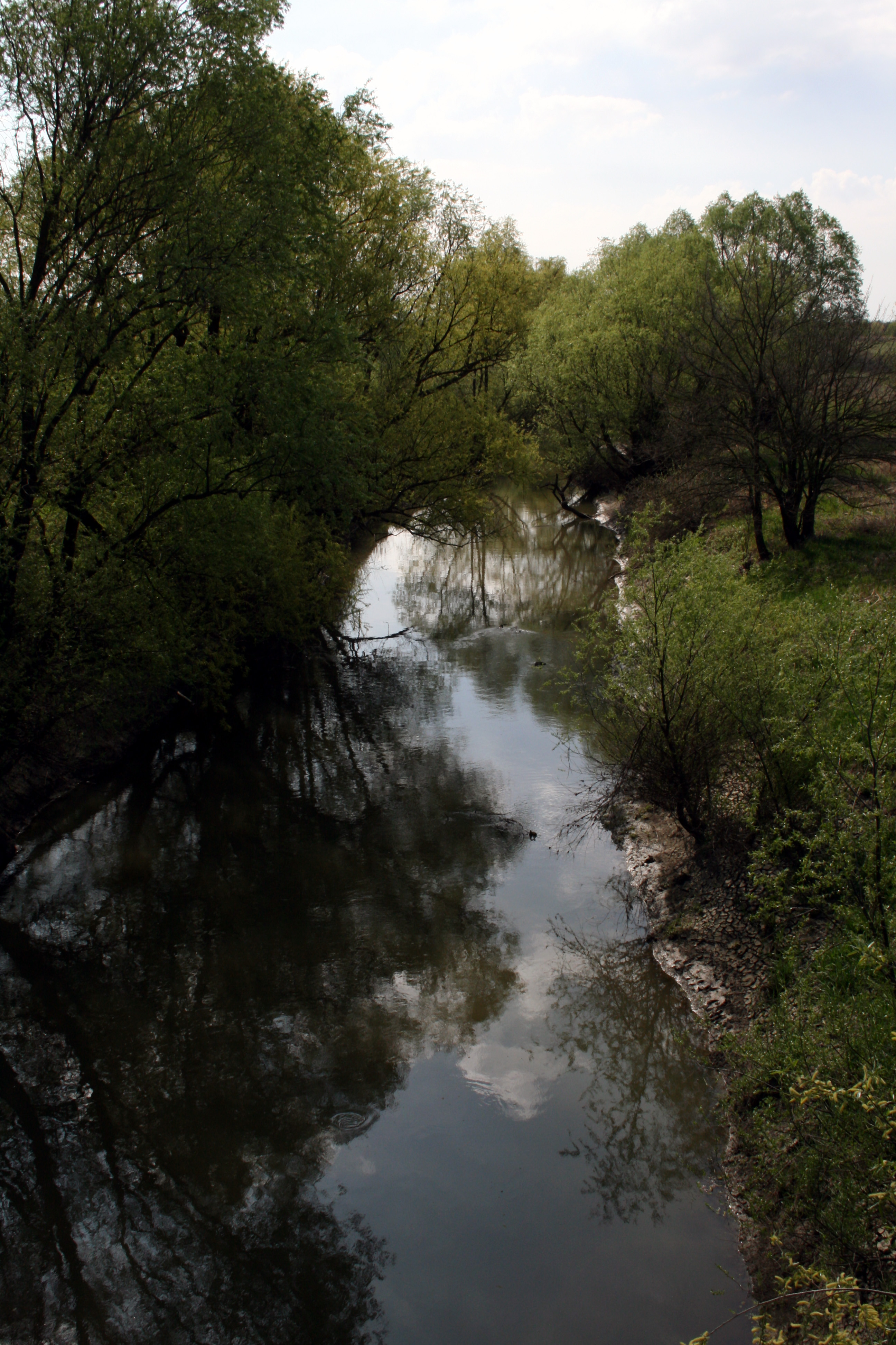 River Kraszna at Mátészalka, Hungary